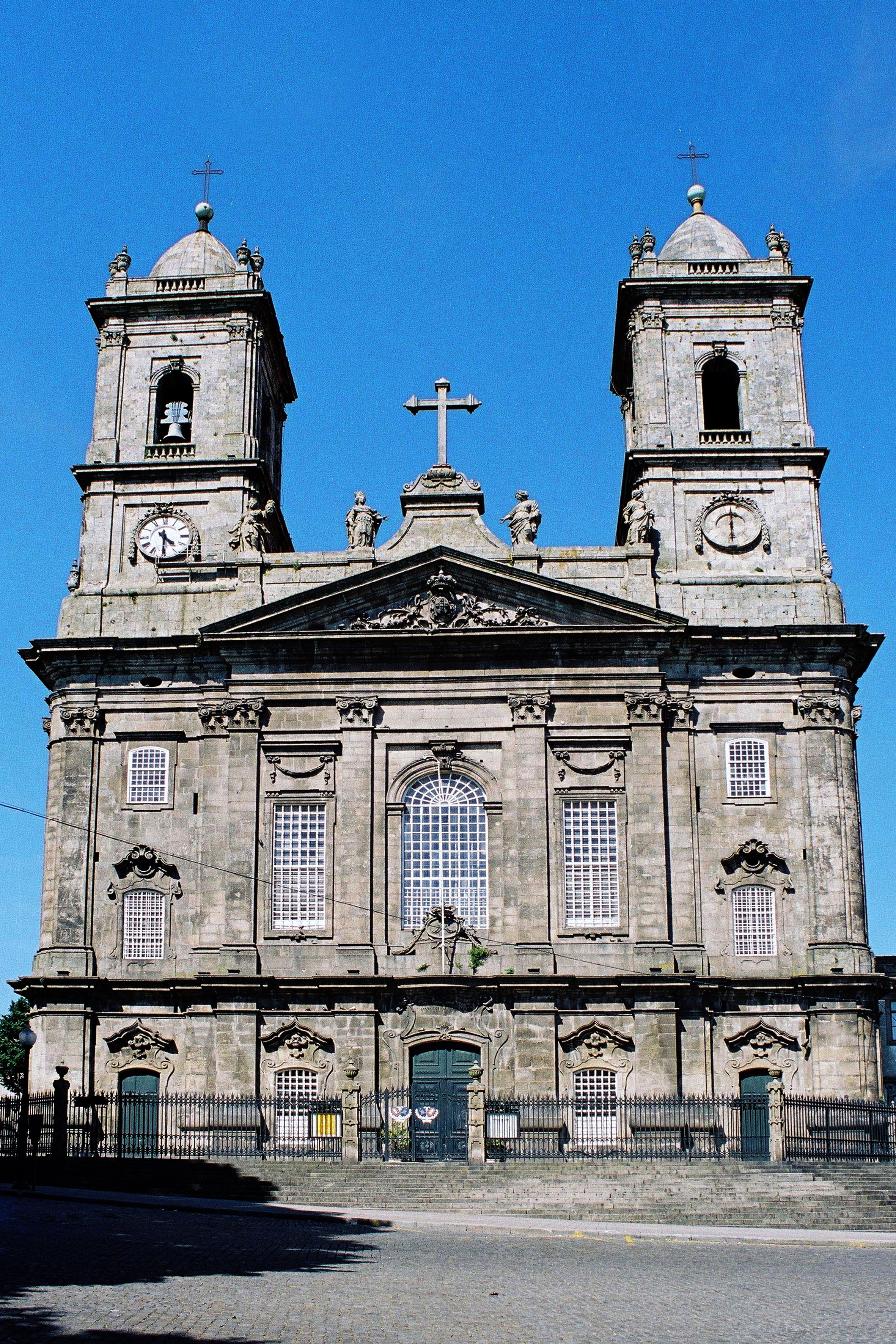 Igreja da Veneravel Irmandade de Nossa Senhora da Lapa